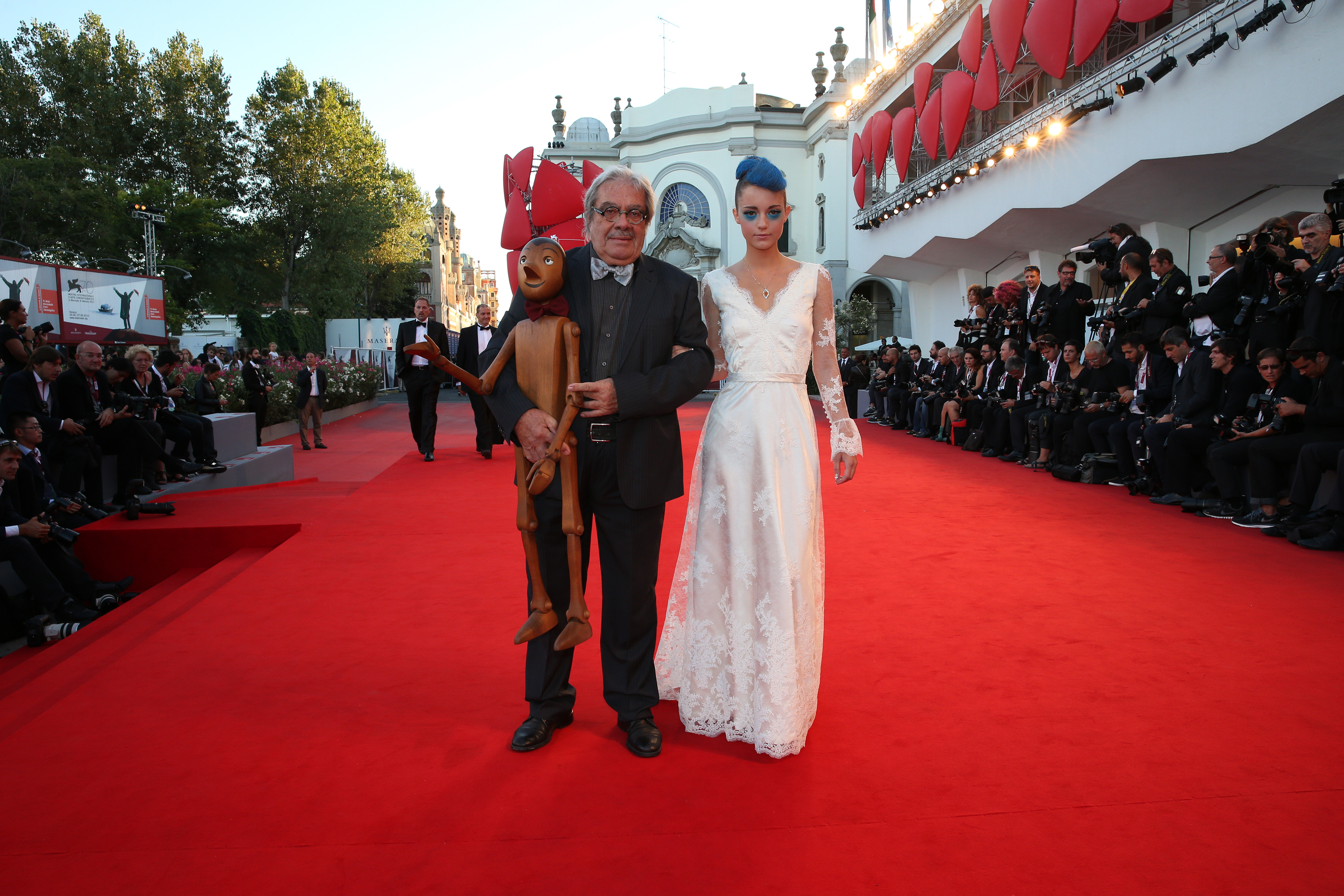 Anniversaire des 130 ans de Pinocchio en septembre 2013 à la Mostra del Cinema di Venezia